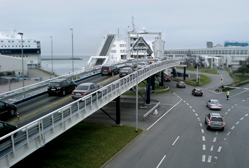 Tilkørselsrampen ved færgen (mod Rødby Havn) i Puttgarden, Tyskland